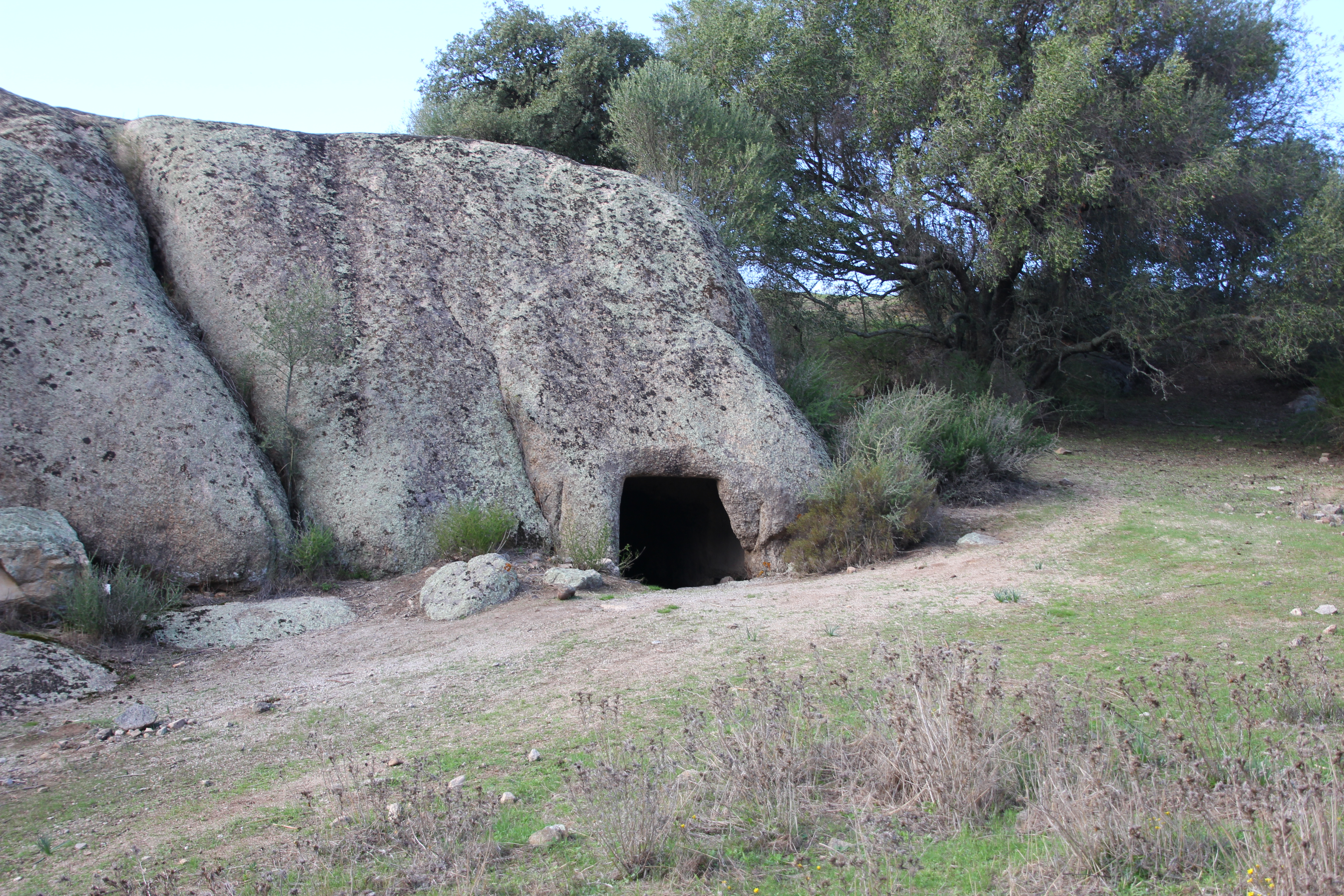 Oschiri - Necropoli di Santo Stefano